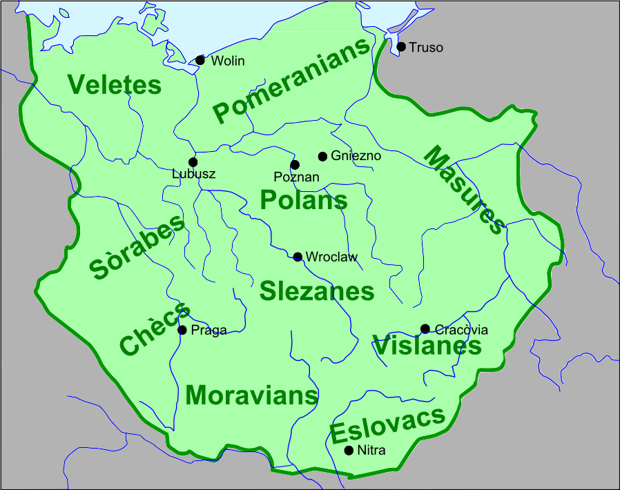 Tribüs principalas deis Eslaus Occidentaus ai sègles IX e X.